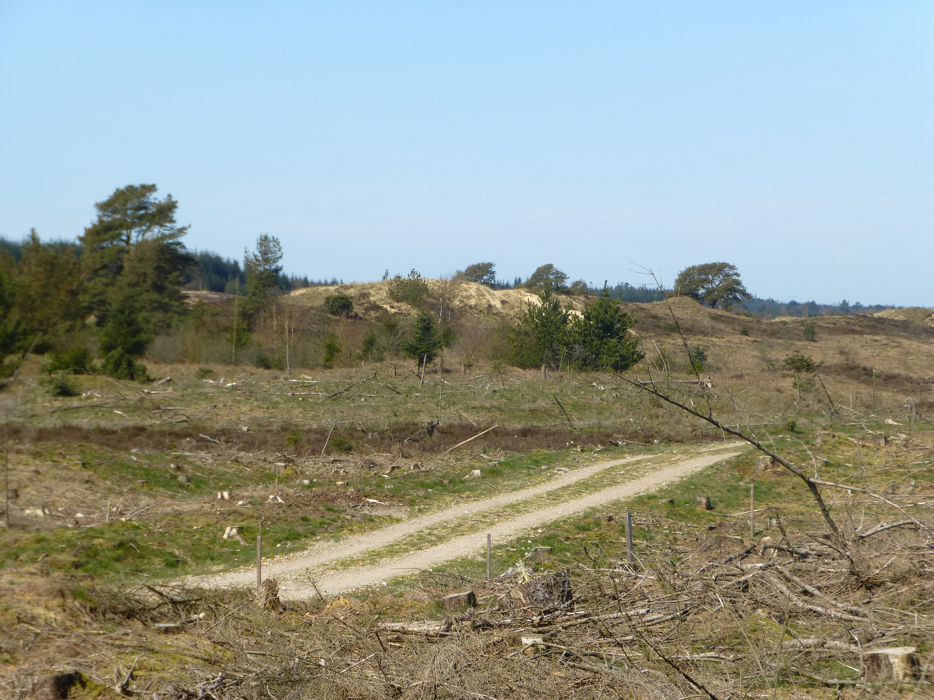 Grene Sande sydvest for Billund